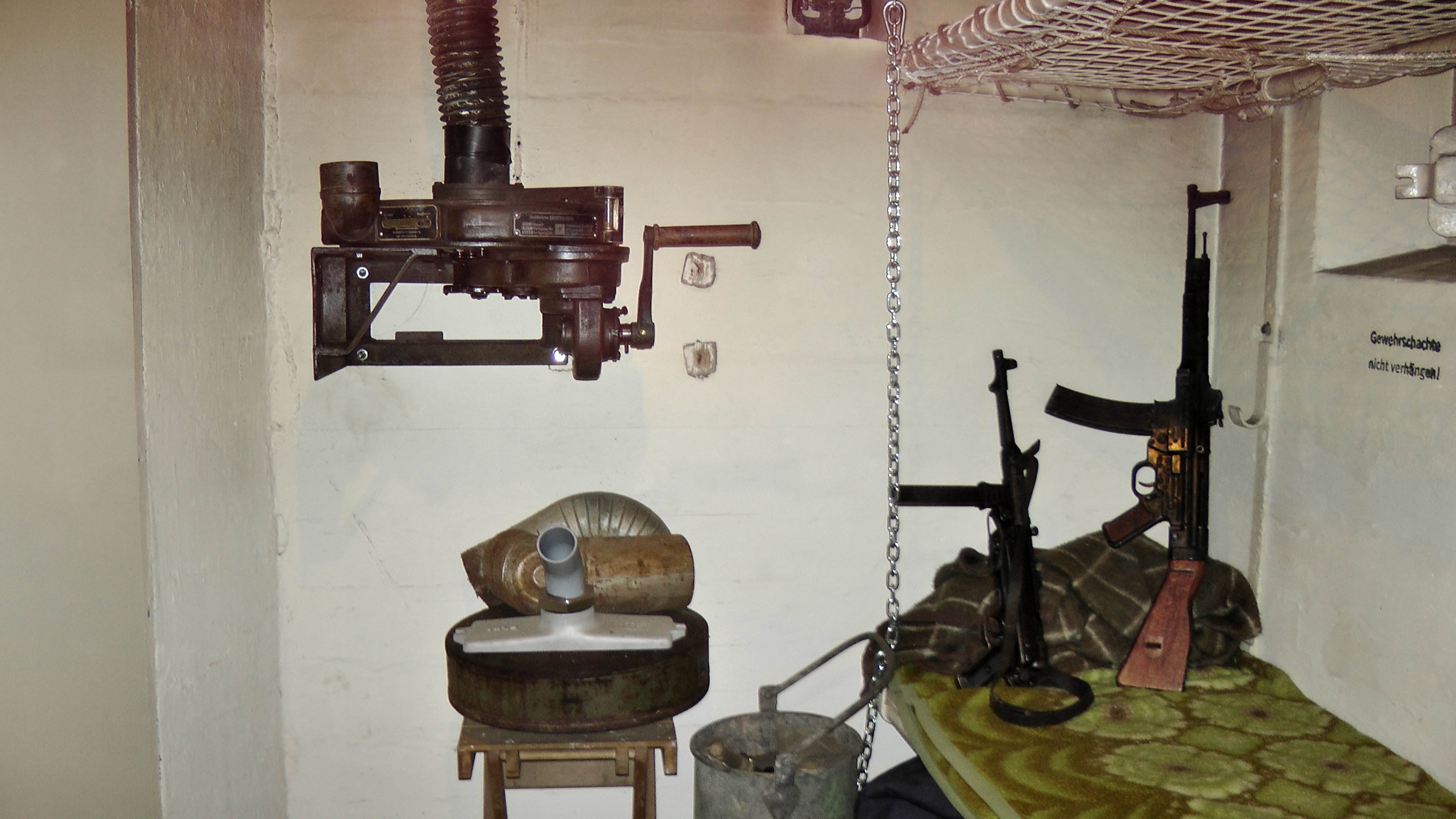 Westwallmuseum Konz, Gasschleuse und Liegen